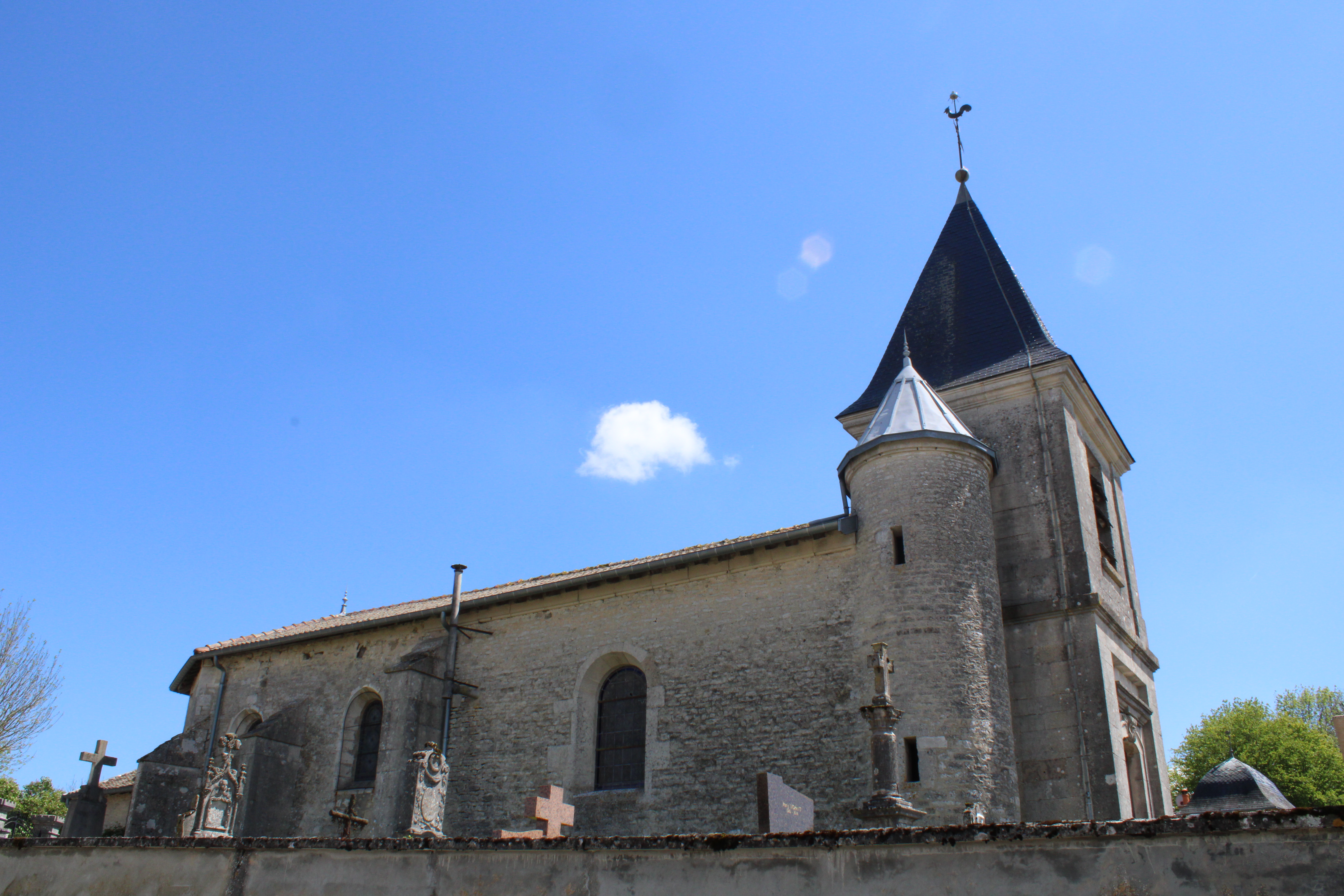 Vue latérale de l'église.